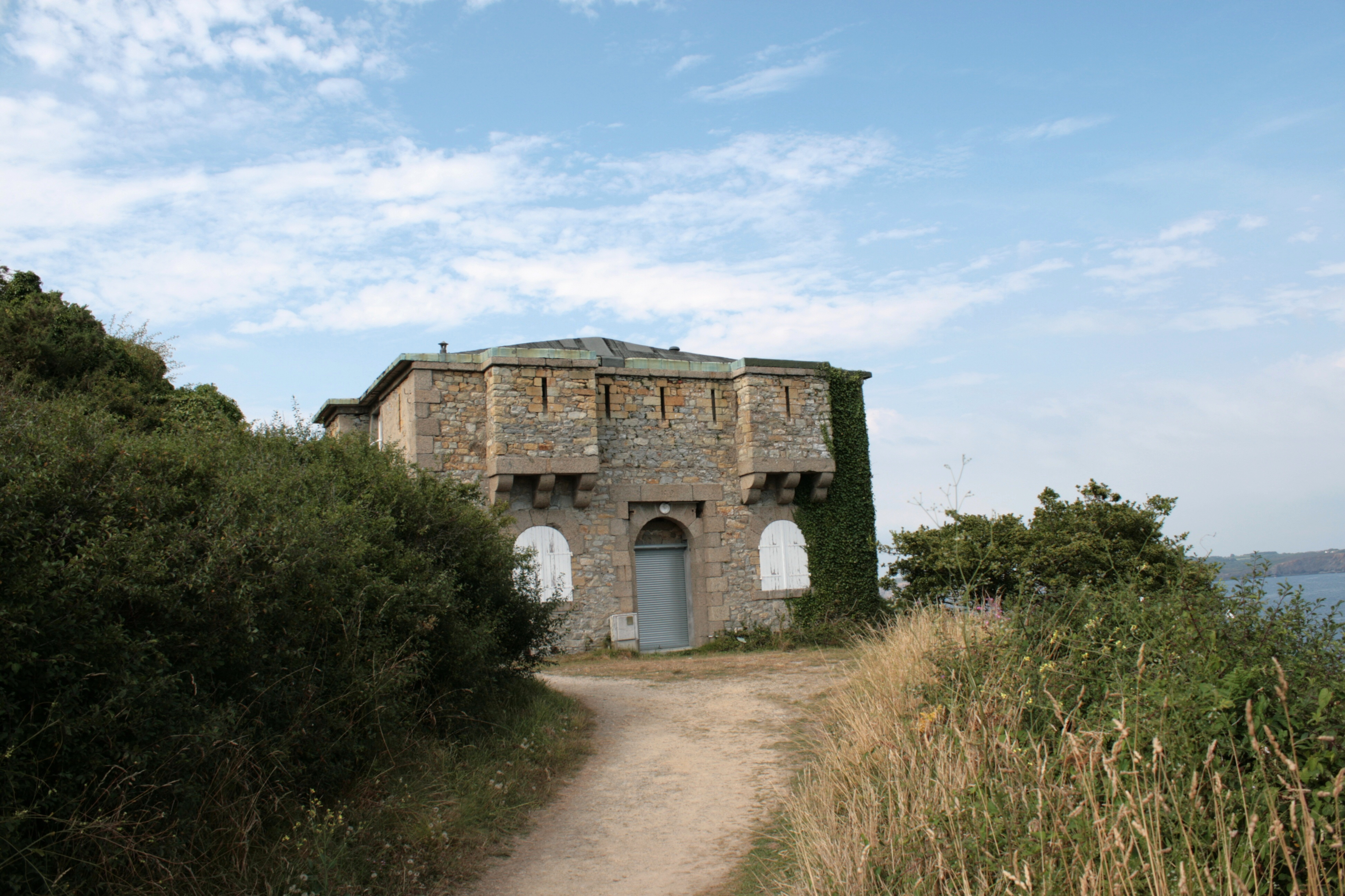 Réduit modèle n°2 type 1846 du Petit Gouin, Pointe du Grand Gouin, Camaret-sur-Mer